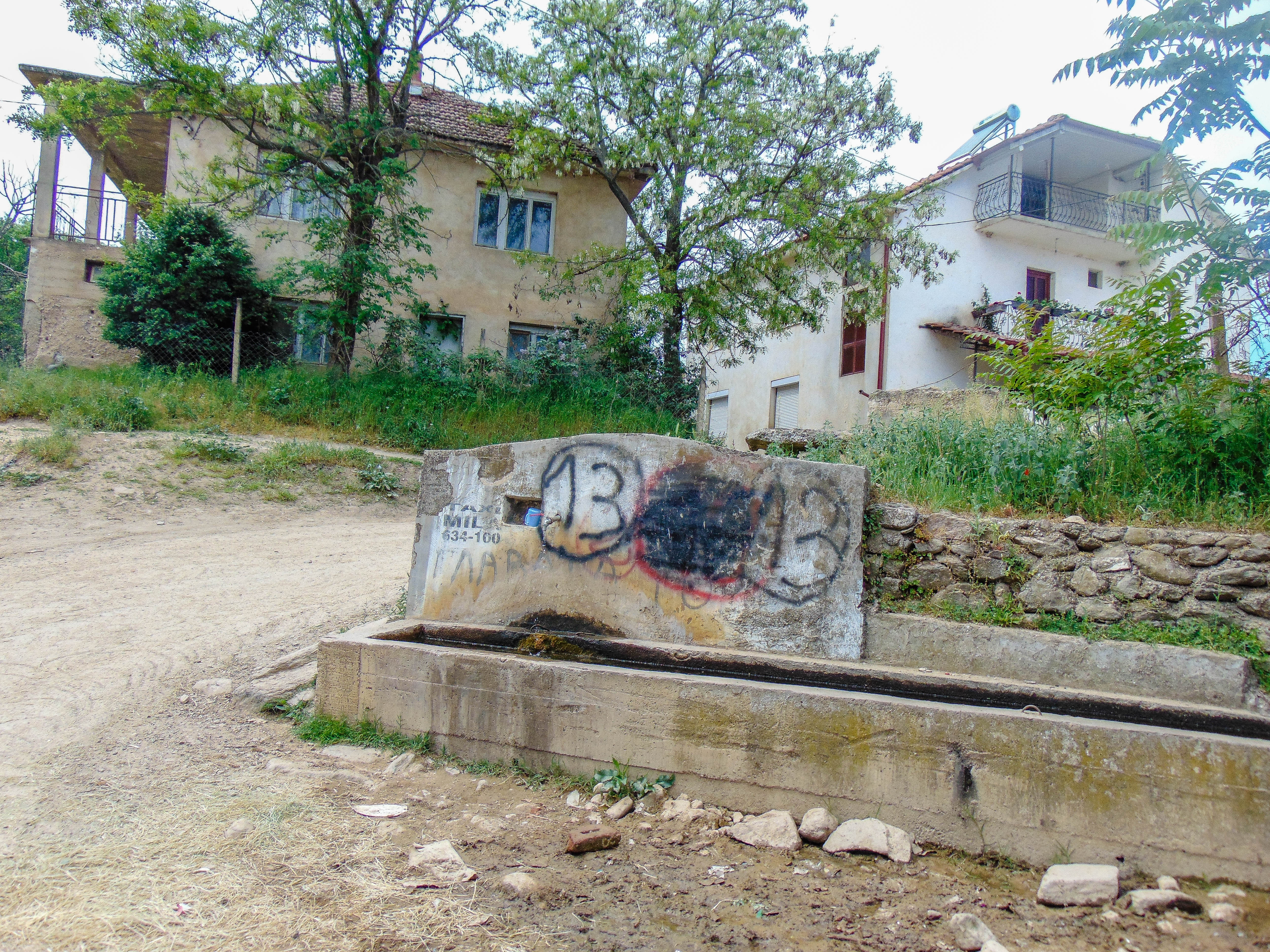 Воиславци